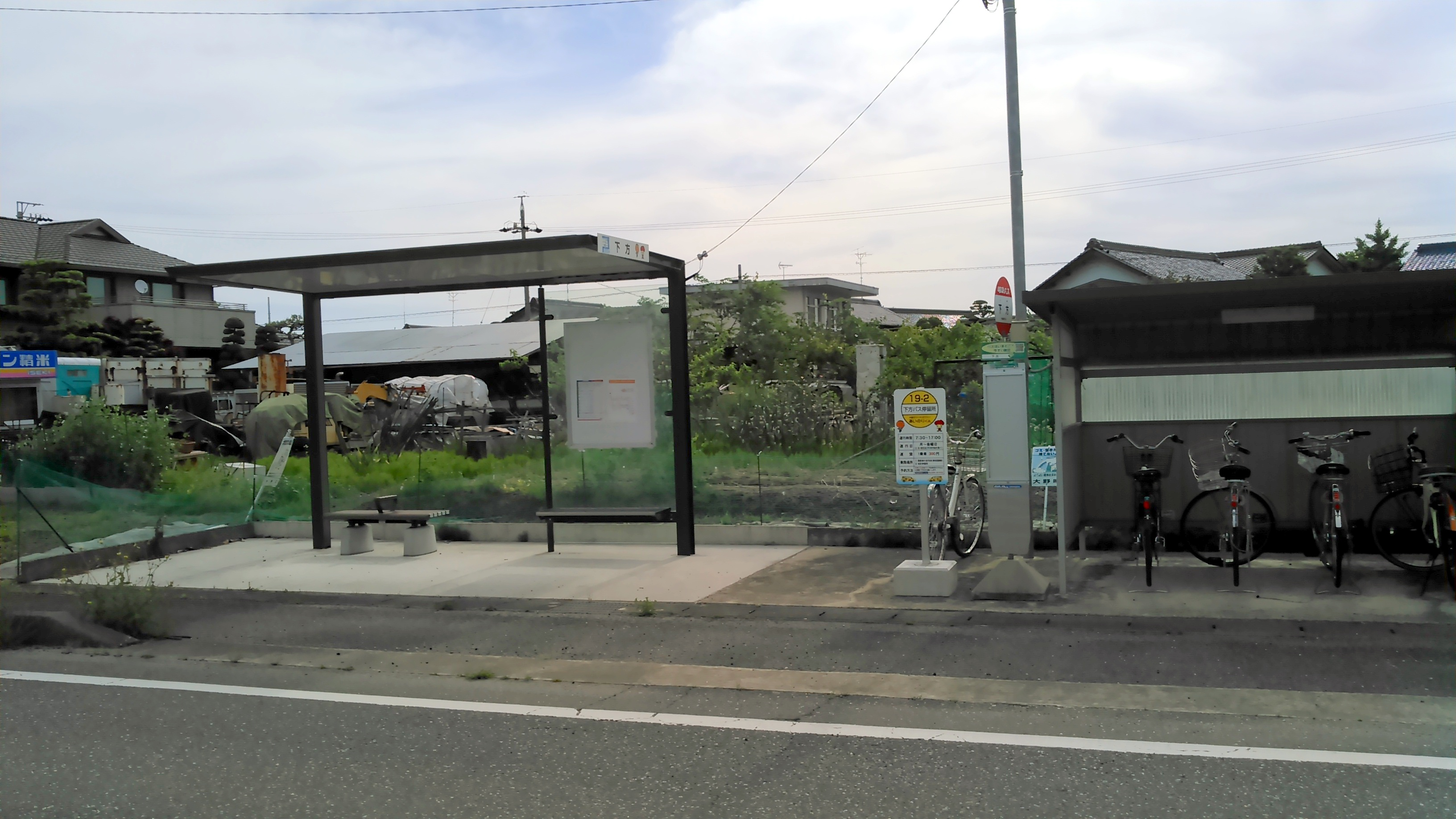 名鉄揖斐線廃線後の代替交通手段。 岐阜バス（岐阜乗合自動車）・大野デマンドタクシーの停留所となっている。 JR・名鉄岐阜駅と大野バスターミナル方面の時刻表が共存している。